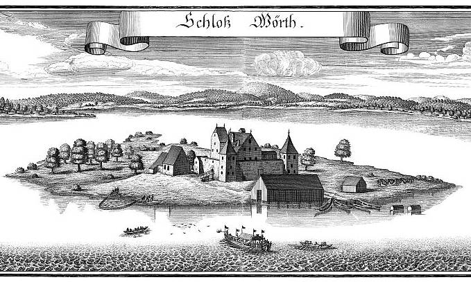 Kupferstich des Wörthschlössls auf der Insel Wörth im Wörthsee, Oberbayern